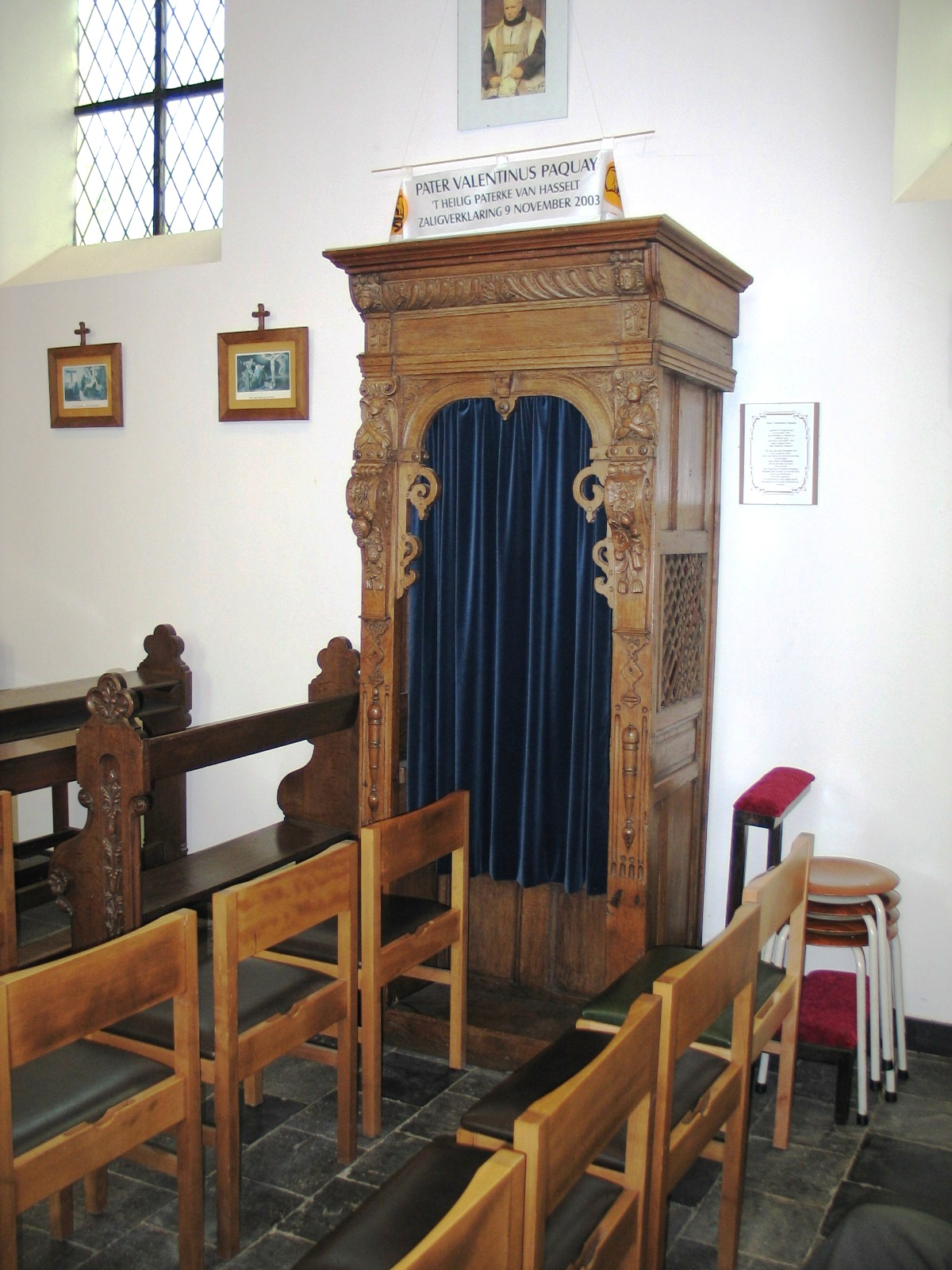 Biechtstoel uit 1570 in de kapel van Helshoven - eigen foto